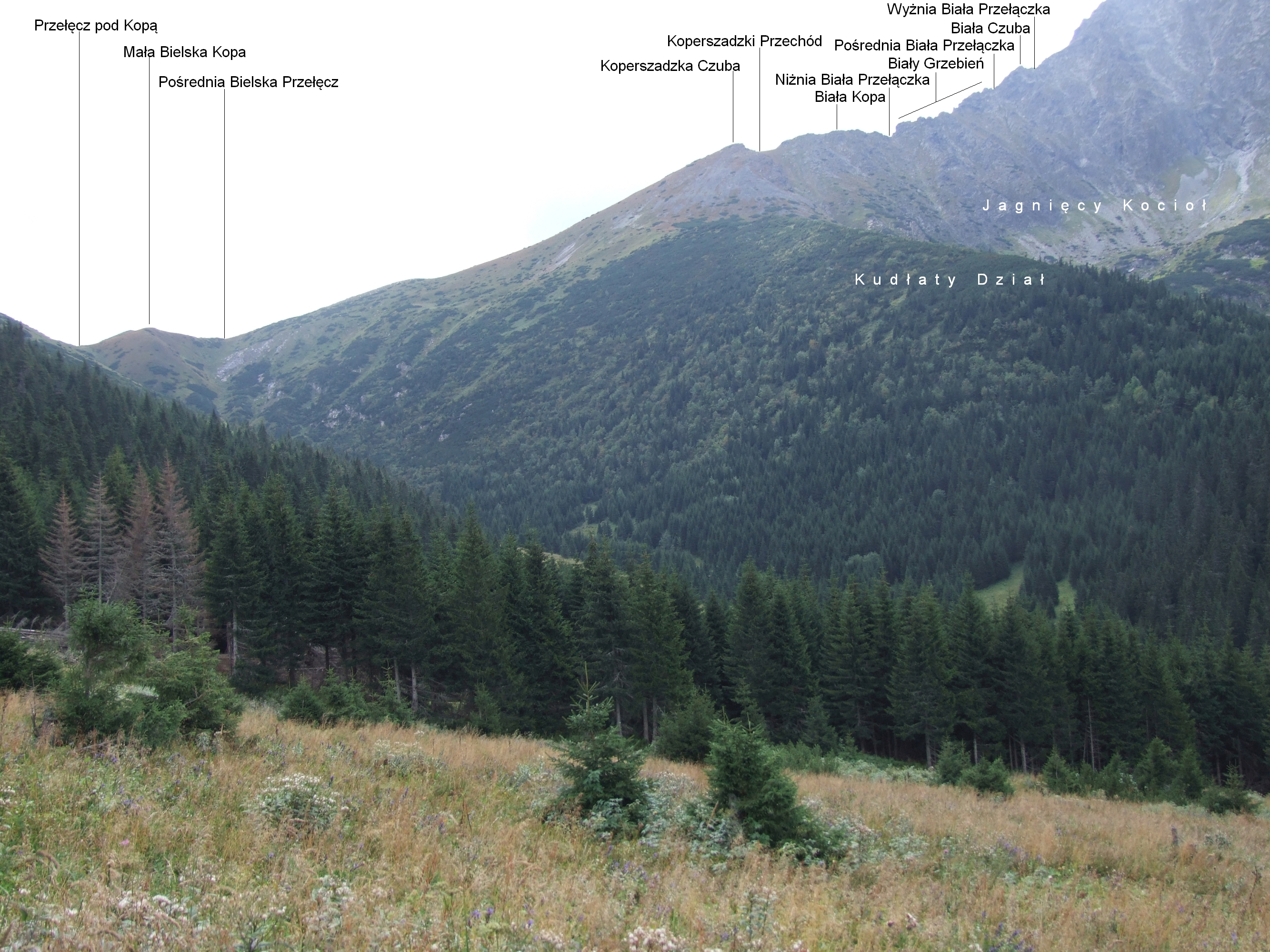 Widok z Zadniej Koperszadzkiej Pastwy